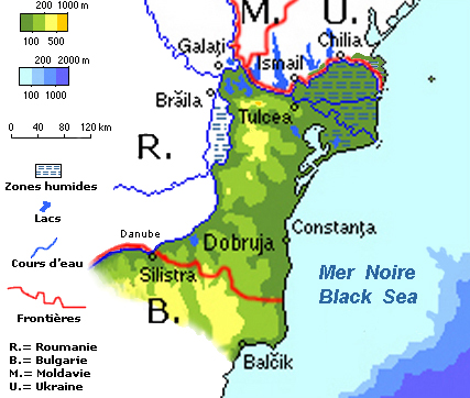 Dobruja.jpg